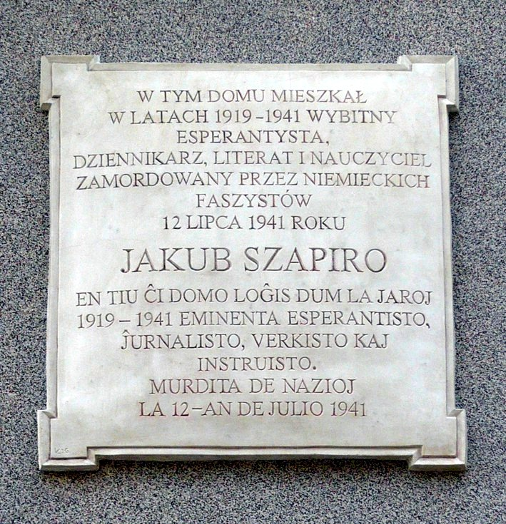 Nova memortabulo pri bjalistoka esperantisto Jakobo Ŝapiro ĉe la str. Lipowa 31/33